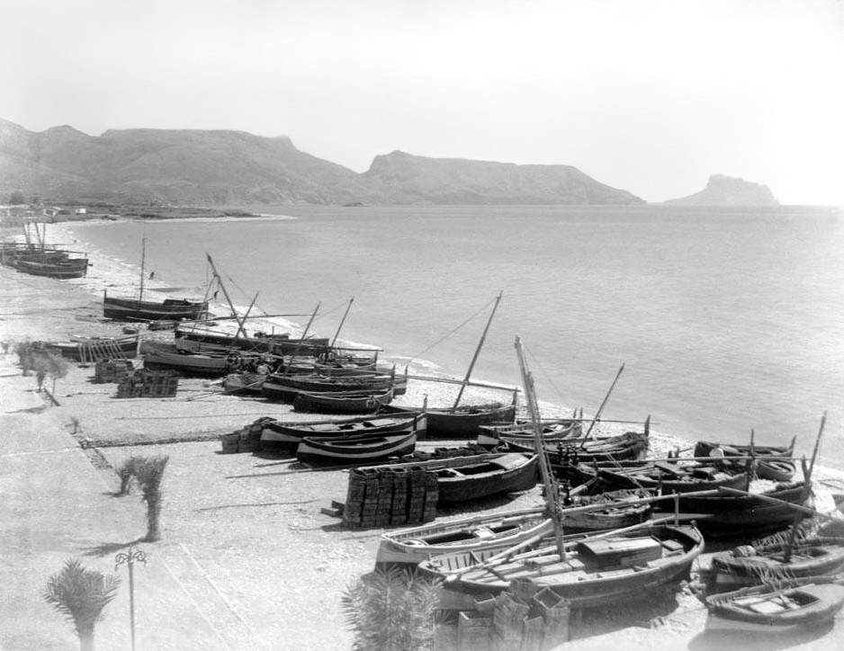 Badia d'Altea i penyal d'Ifac. Enric Ribas i Virgili (Entre 1920 i 1930)